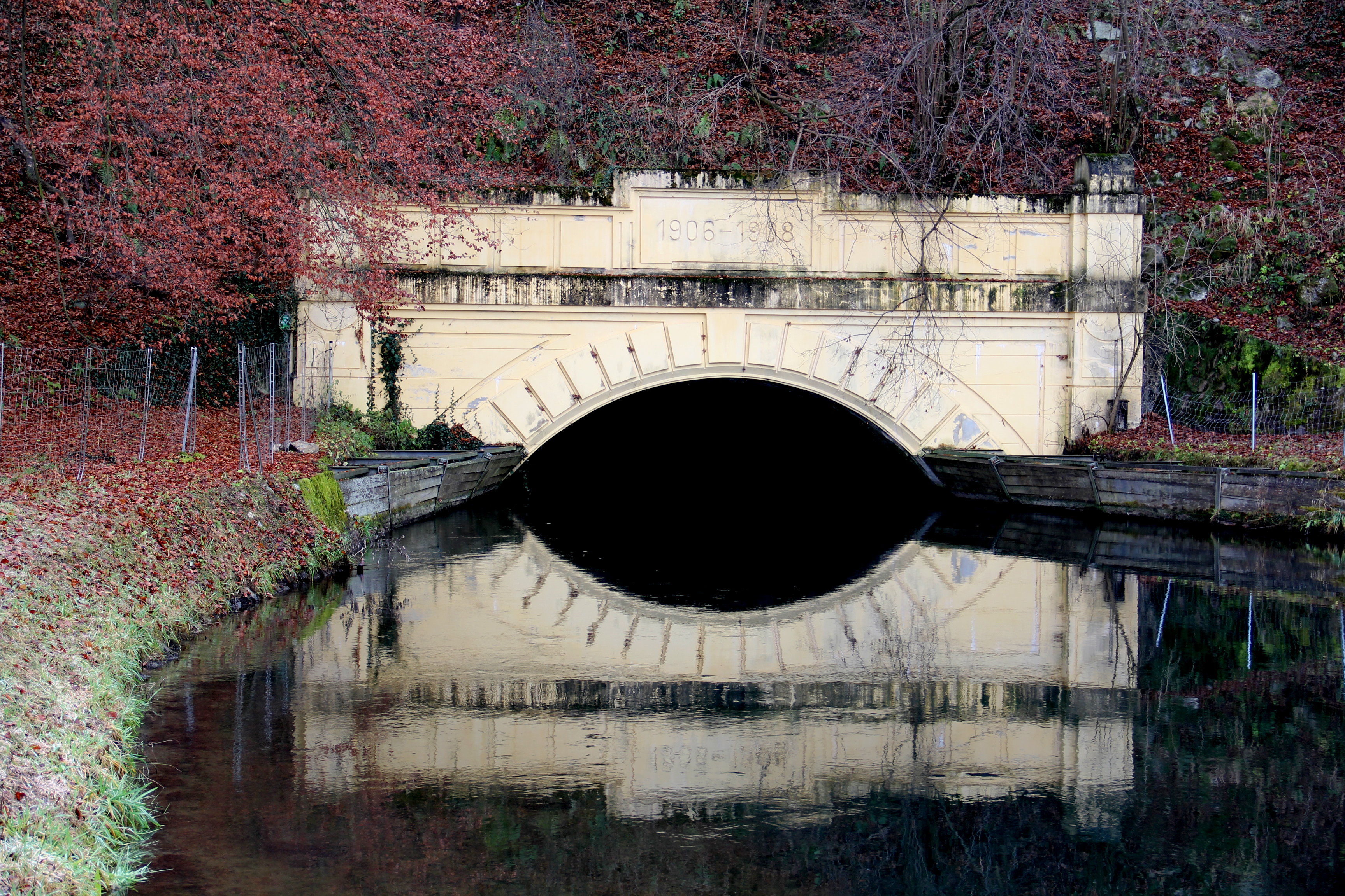 Kraftwerk Peggau-Deutschfeistritz, Nördliches Stollenportal